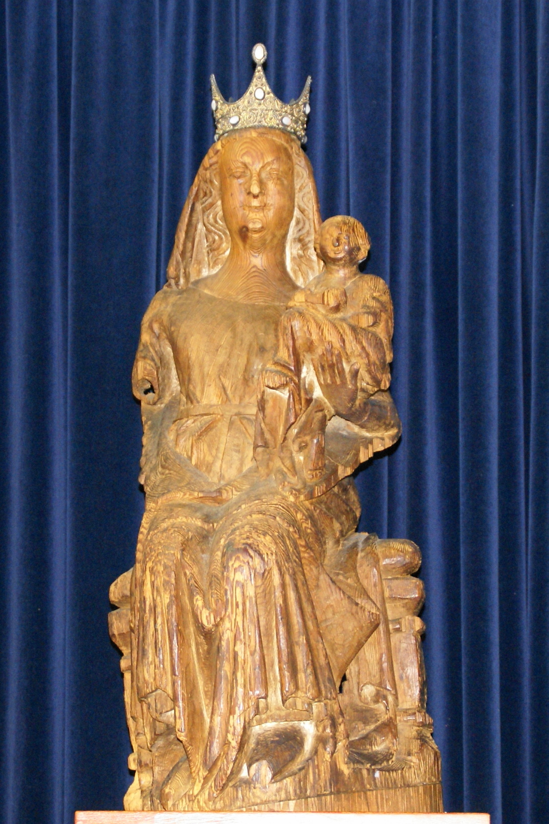 Marienstatue